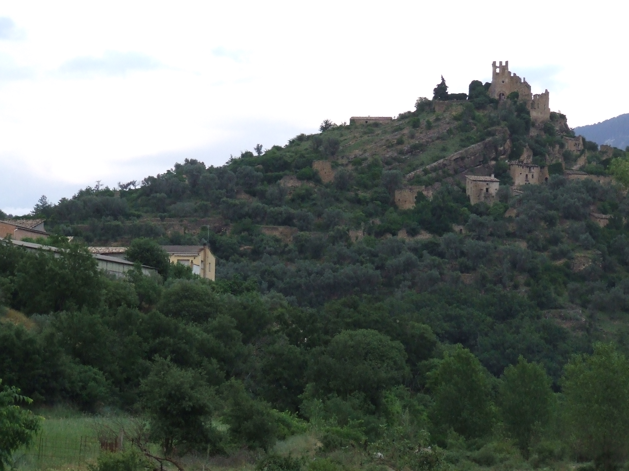 Aramunt Vell (Conca de Dalt, Pallars Jussà)